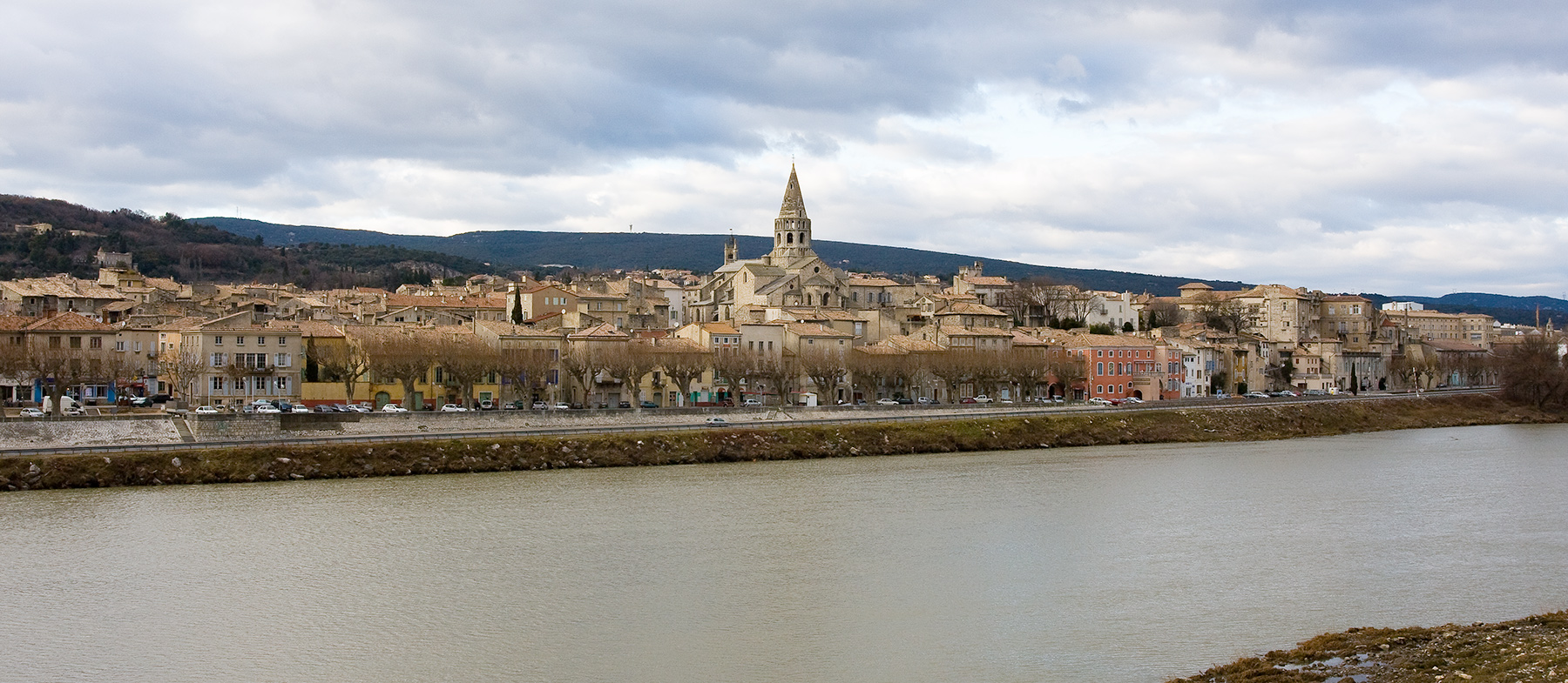 Bourg Saint Andéol vu depuis le pont. L'église Saint Andéol domine la vieille ville et les anciens quais du Rhône.